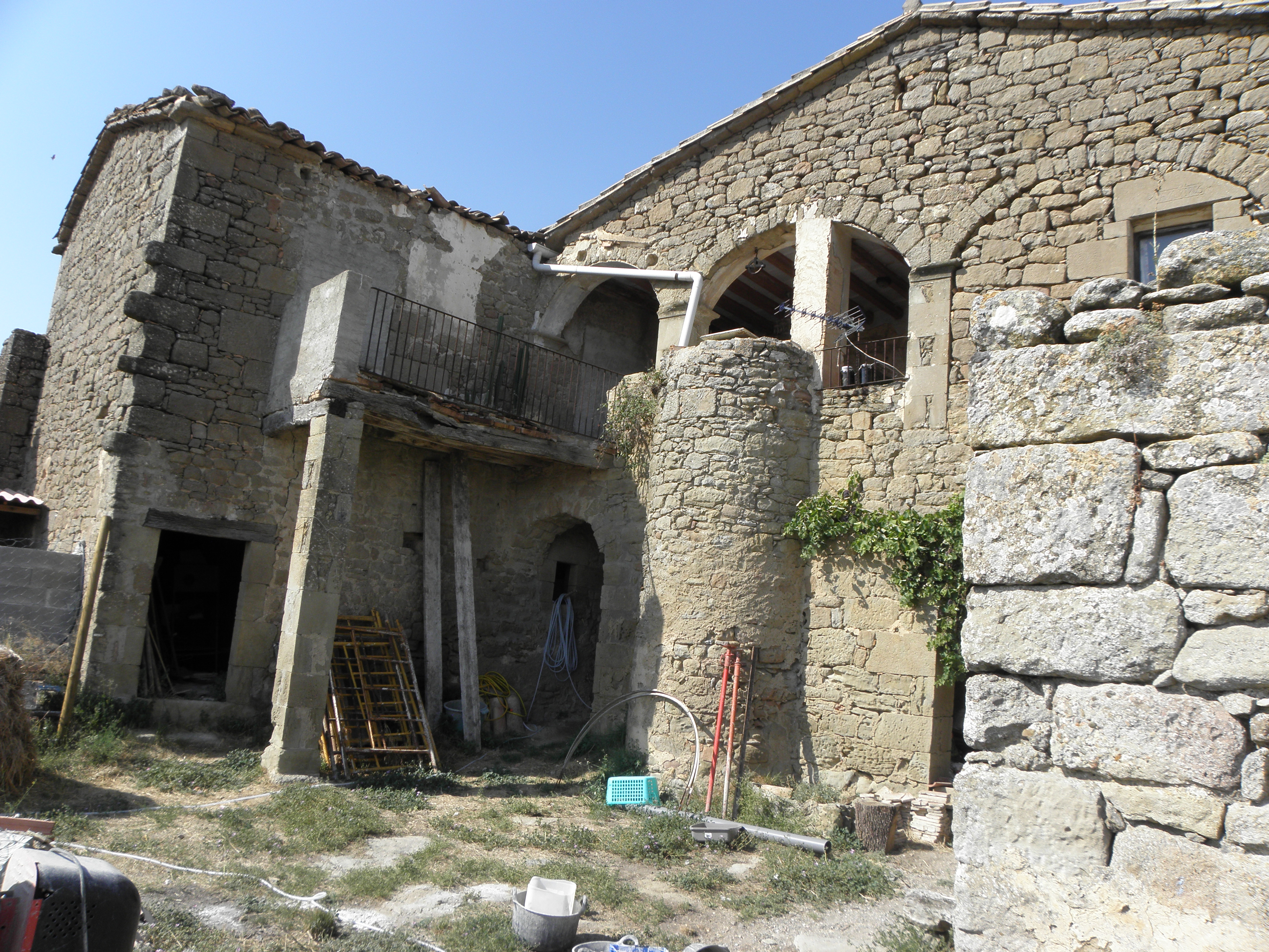 La Rectoria de Miravé, municipi de Pinell de Solsonès, vista des del nord-oest.